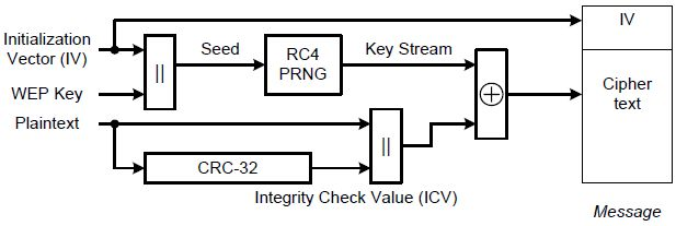 Монгол: adfadf